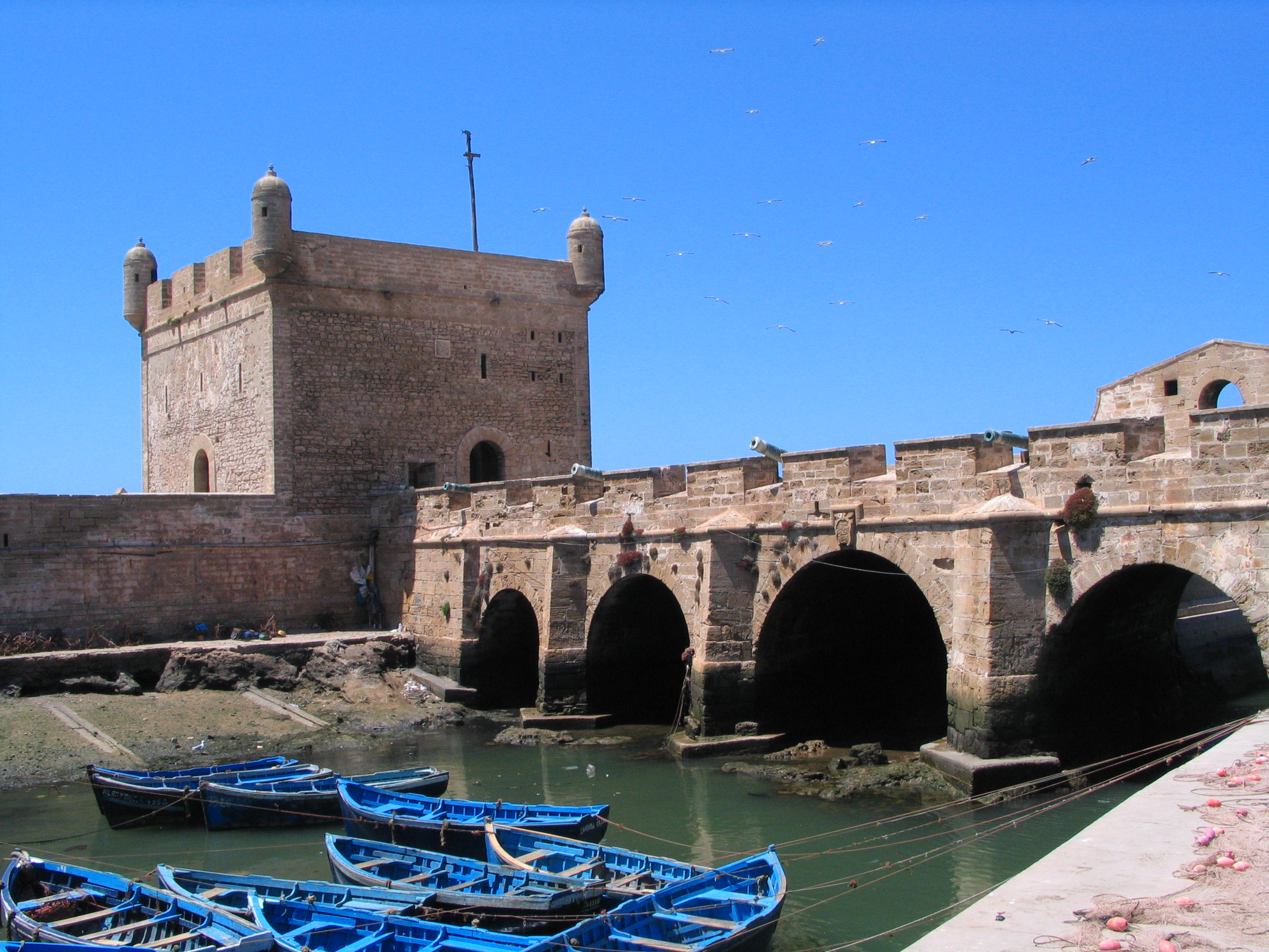 Essaouira (Maroc), le port, les barques de pêcheurs et les remparts